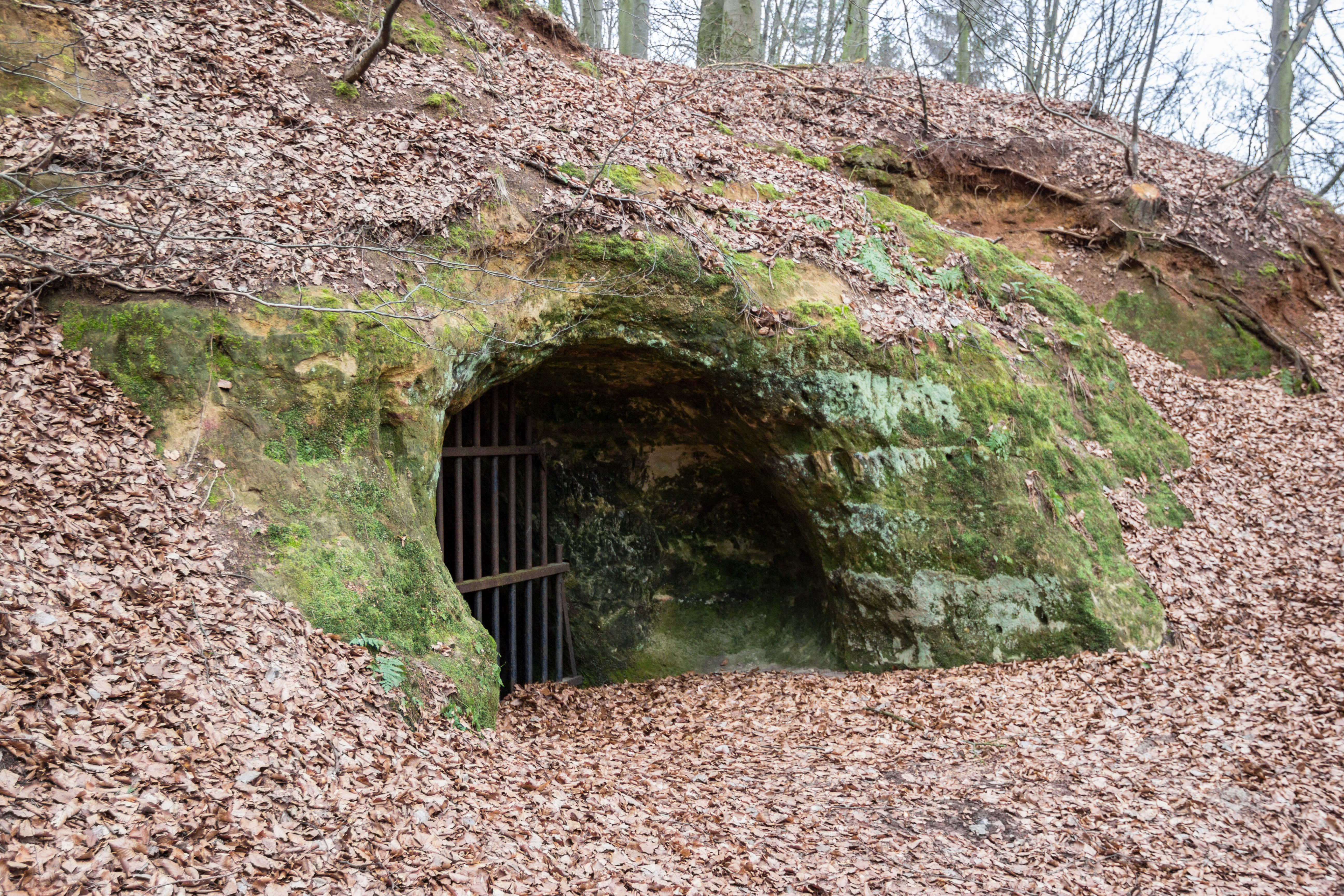 Heidenloch, Silbersandhöhle, Weissenbrunn